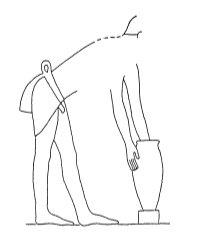 Keramikherstellung im Alten Ägypten nach einer Darstellung in der Mastaba des Ti aus dem Alten Reich; Aufziehen eines Kruges auf dem Drehuntersatz